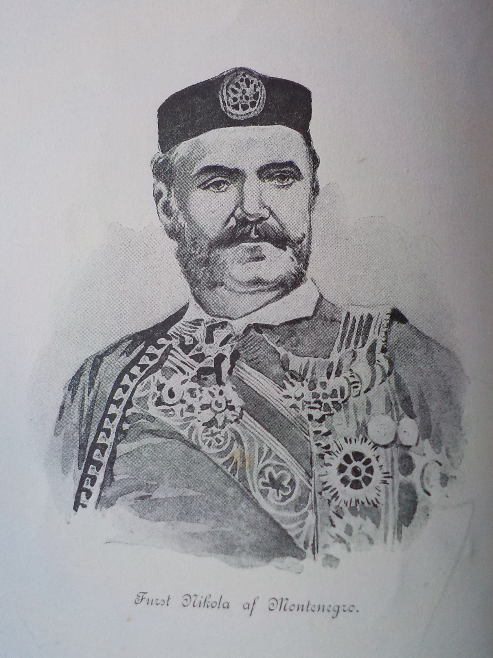 Bild från boken Slavia - ny följd utgiven 1896, skriven av Alfred Jensen.